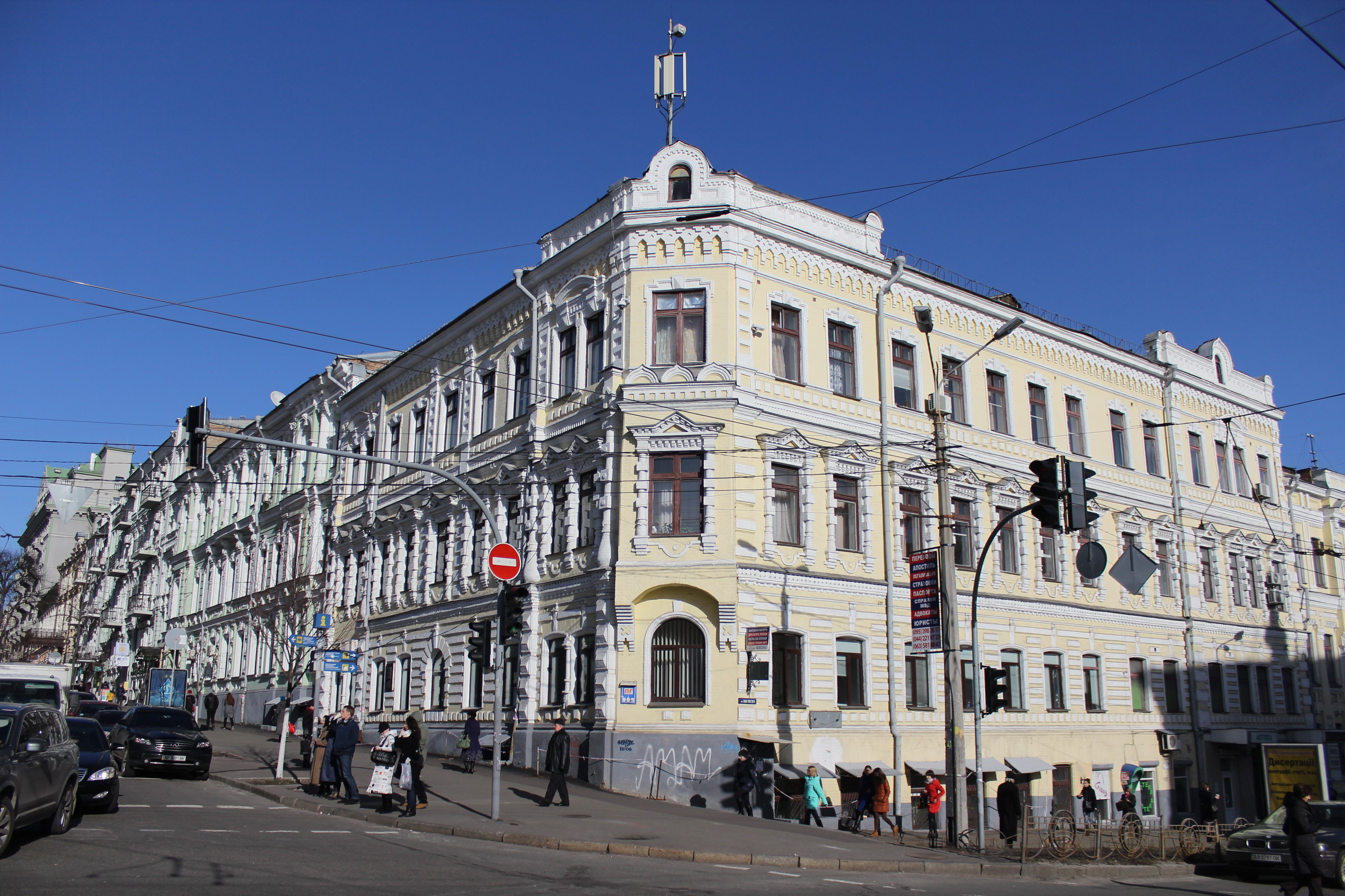 Будинок прибутковий, в якому жила Алла Горська, художниця, Київ, Терещенківська вул., 25